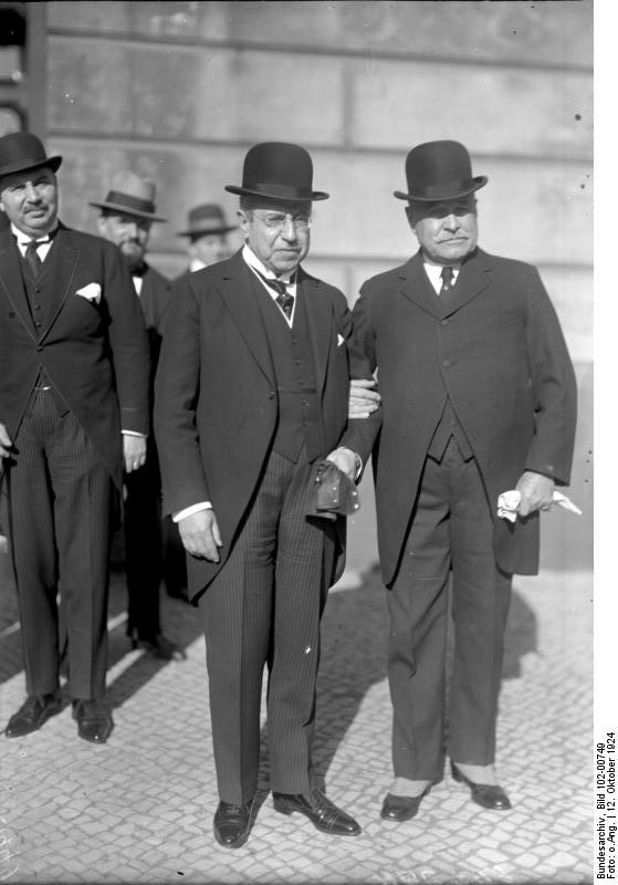 Ein Fest der Spanier anläßlich der Entdeckung Amerikas fand am 12. Oktober in der Universität unter Anwesenheit des gesamten diplomatischen Corps statt. Links der spanische Botschafter in Berlin, rechts der Minister von Uruguay beim Verlassen der Universität nach der Feier.